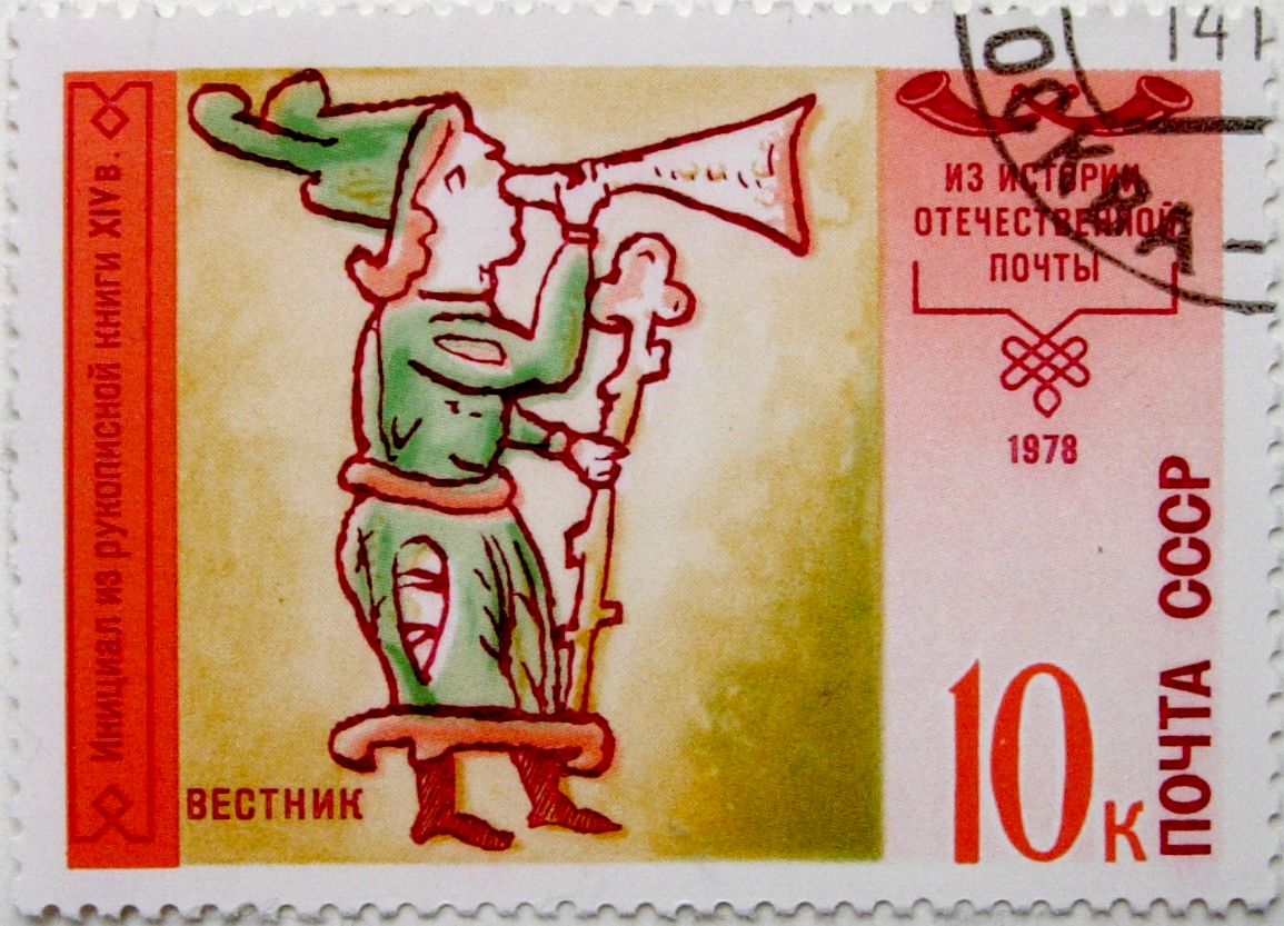 Инициал из рукописной книги XIV века. Из истории отечественной почты. Марка Почты СССР. 1978 год.